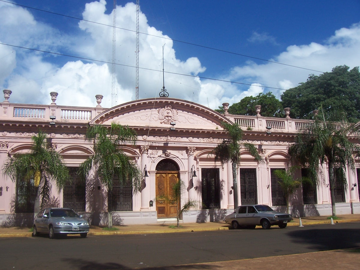 La Casa de Gobierno de la provincia de Misiones, en Posadas.